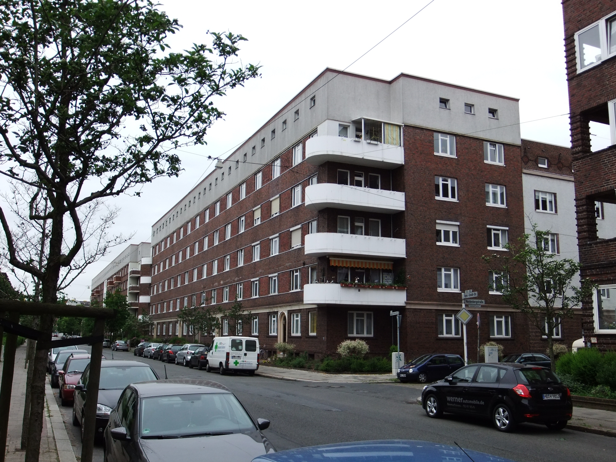 Gemeinnützige Wohnungsfürsorge - Baugruppe IV in Bremerhaven, Bürgermeister-Smidt-Straße 187 . Das abgebildete Objekt ist ein geschütztes Kulturdenkmal in der Freien Hansestadt Bremen, mit der Nr. 3276 beim Landesamt für Denkmalpflege registriert.